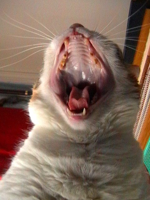 Dentadura y bigotes Lari jorgegetafe